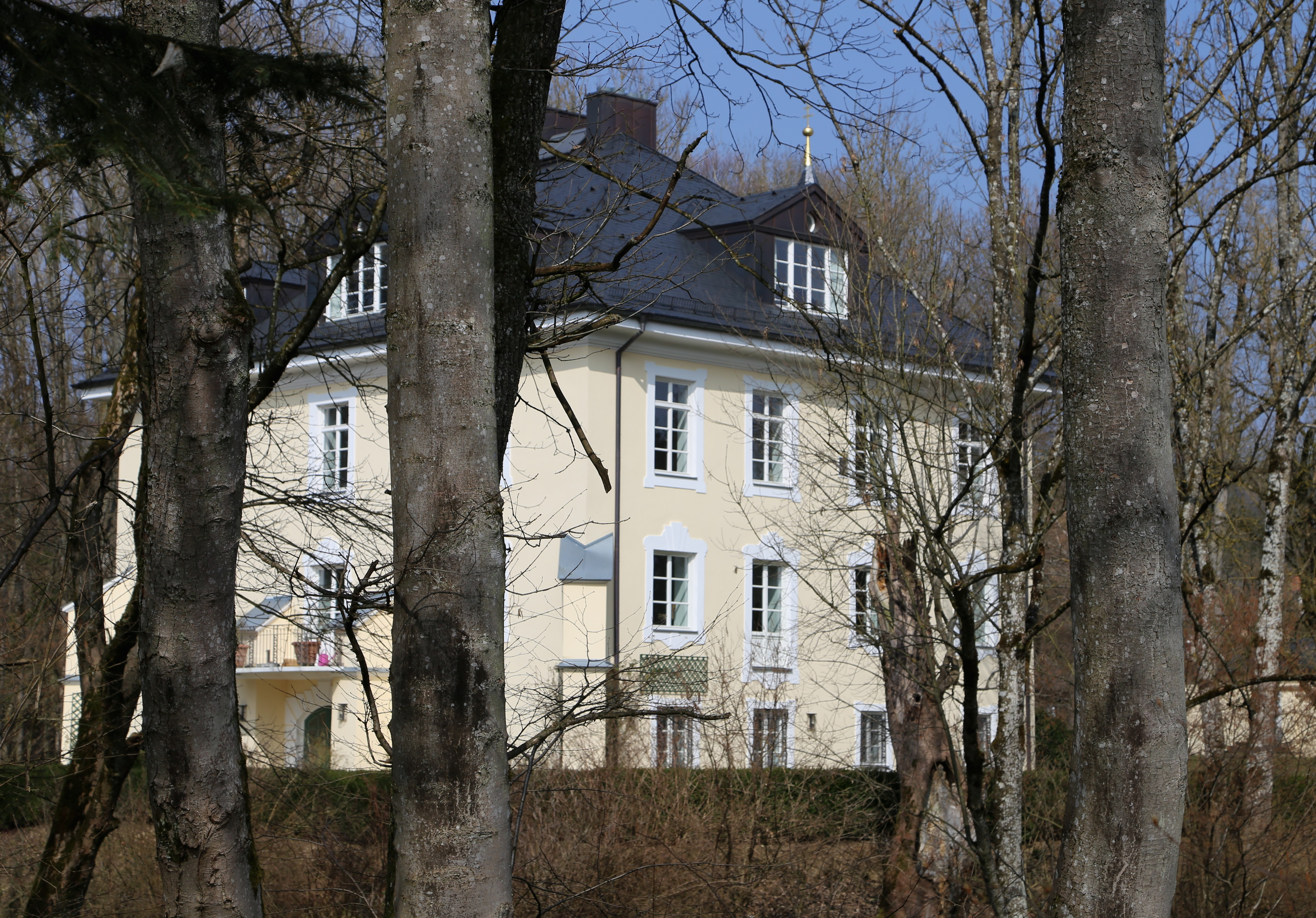 Schloss Falkenberg, Moosach, Landkreis Ebersberg